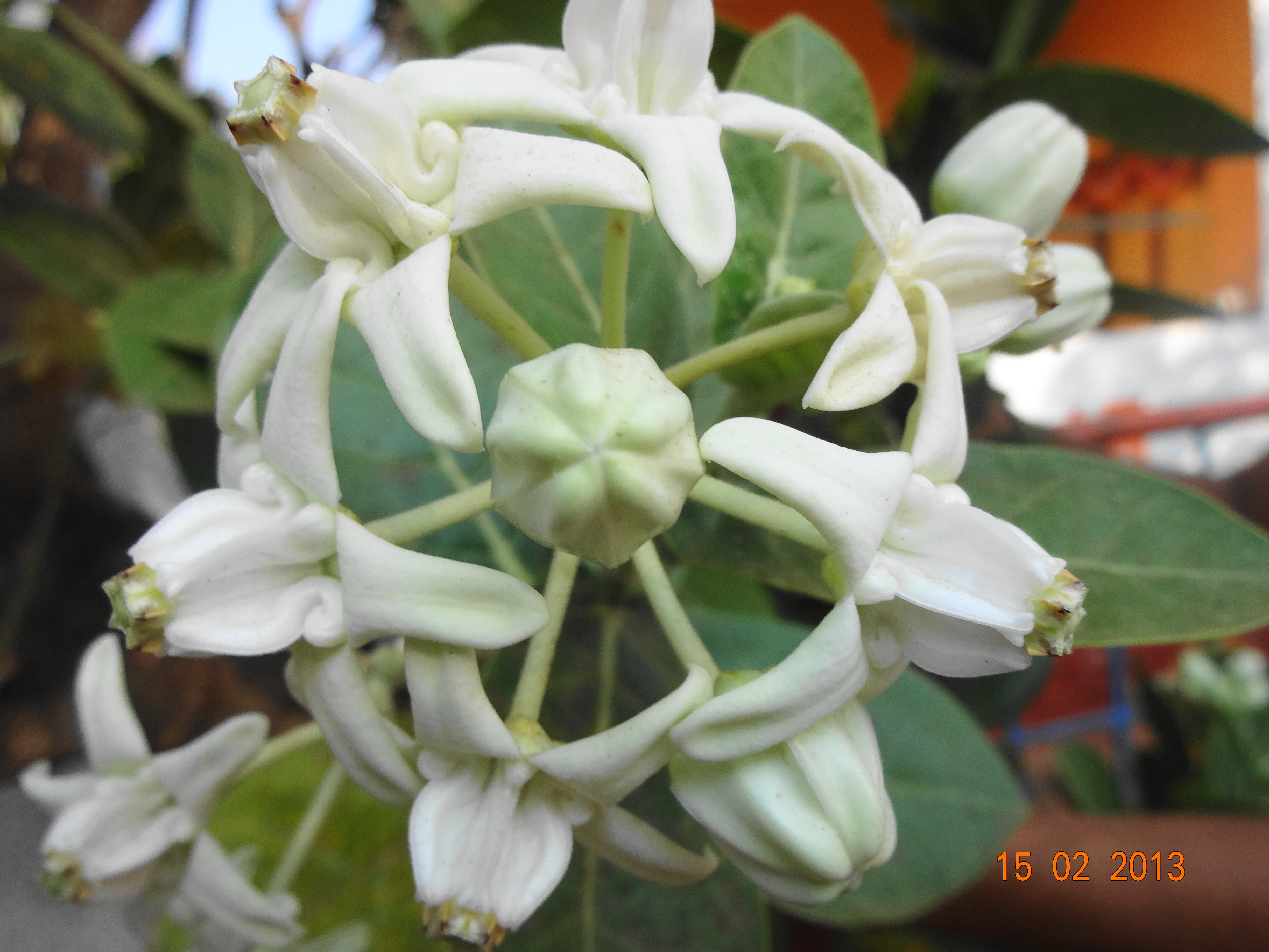 Calotropis gigantea (Arka) at Hubli,Karnataka